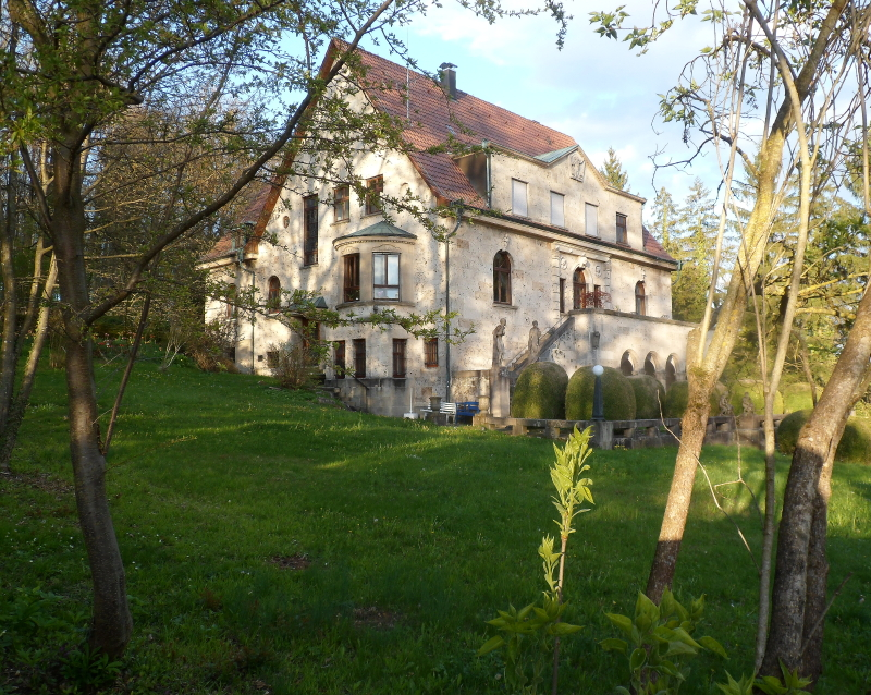 Villa Sonnhalde auf dem Berghof in Lustnau. Wohnsitz der Anna Bosch in den Jahren 1926–1949.